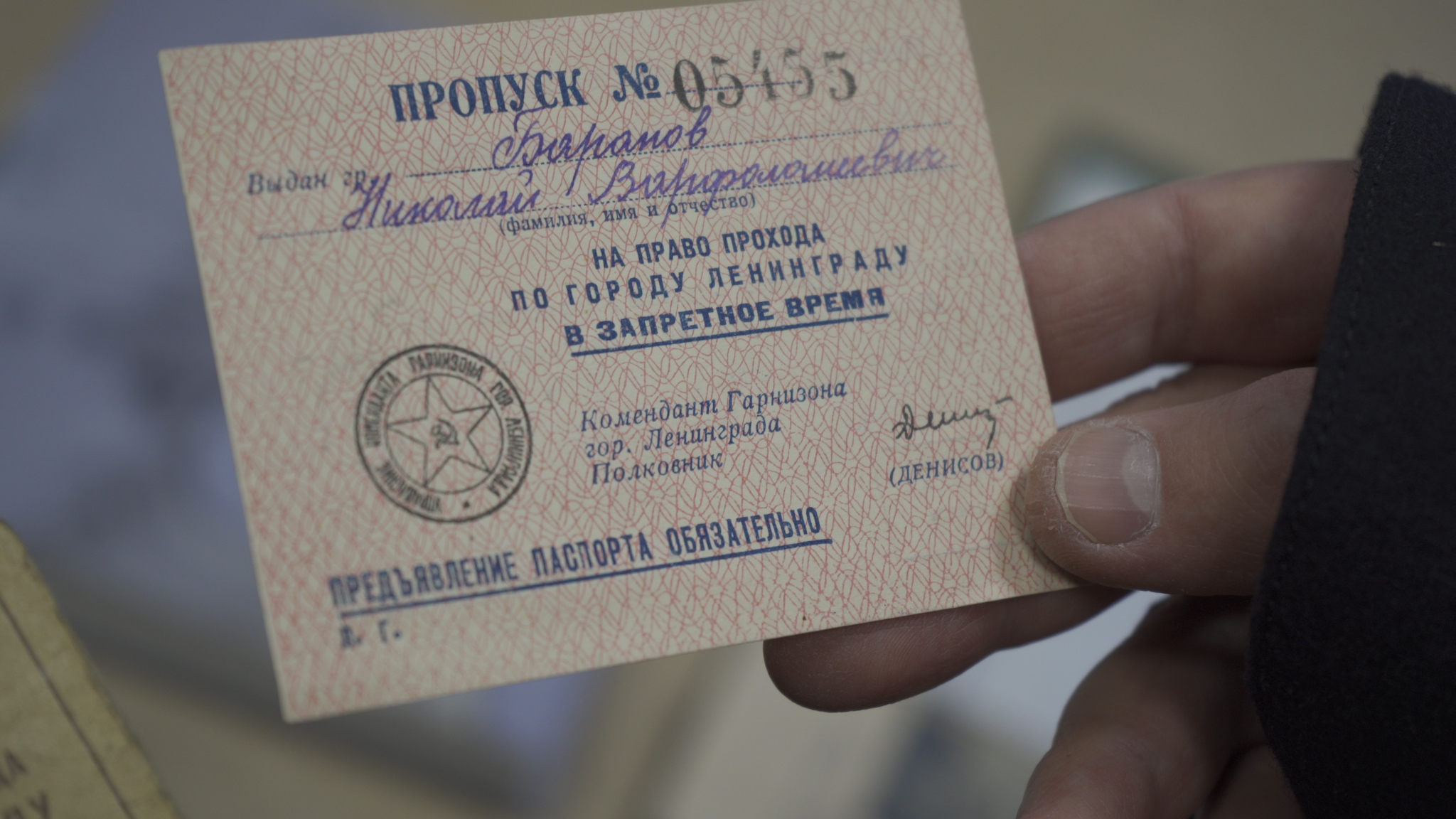 Блокадный пропуск главного архитектор Ленинграда Н. В. Баранова на право прохода по городу в запретное время. Фото сделано на съемках документального фильма «Архитектура блокады», 2019 год.